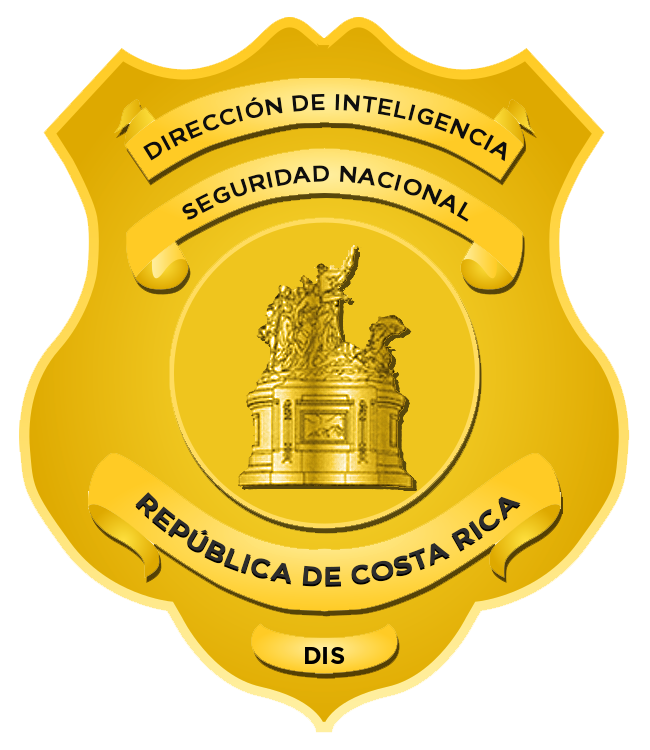 Escudo de la Dirección de Inteligencia y Seguridad (DIS) de Costa Rica.